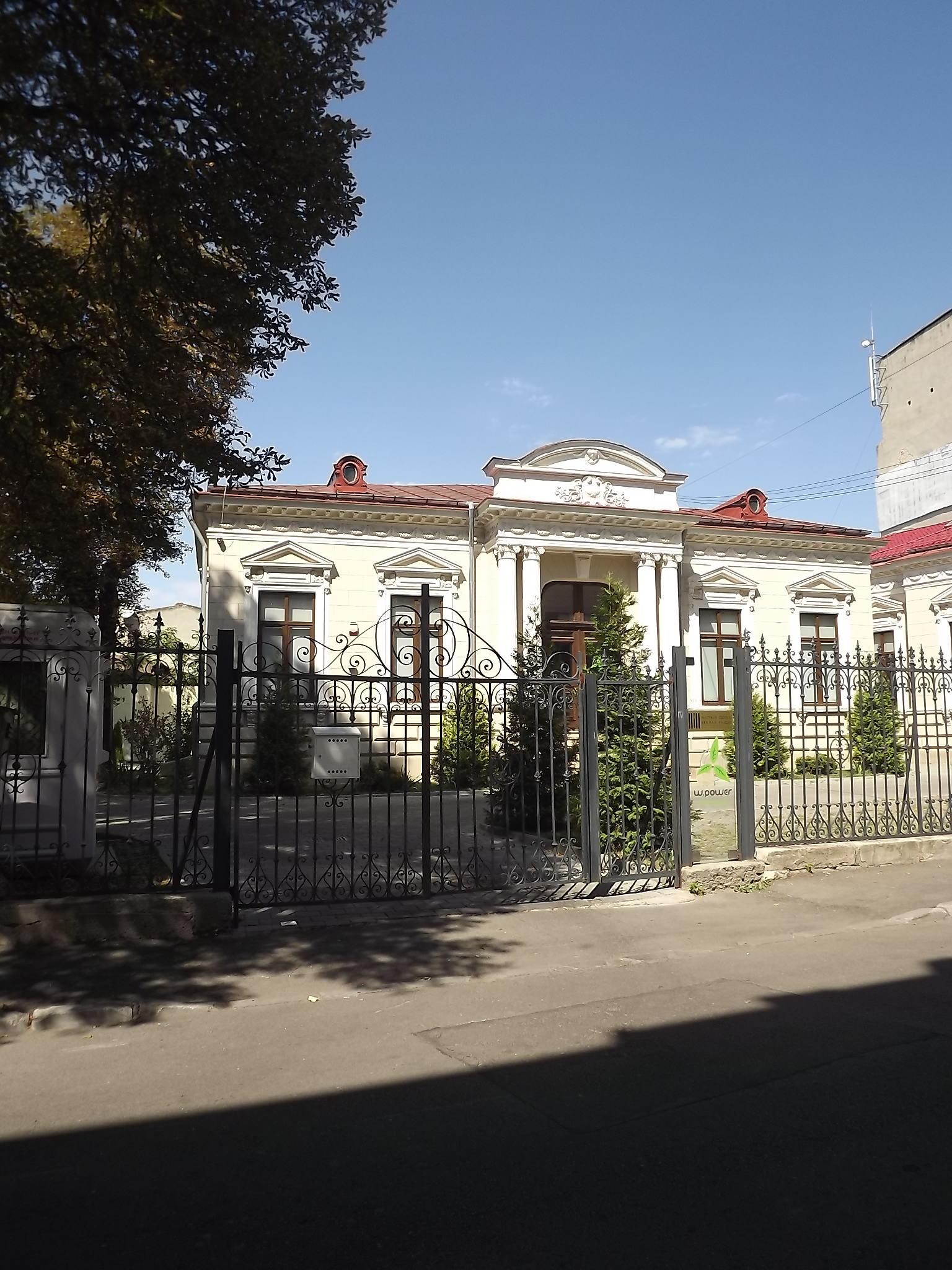 Casăgtwer